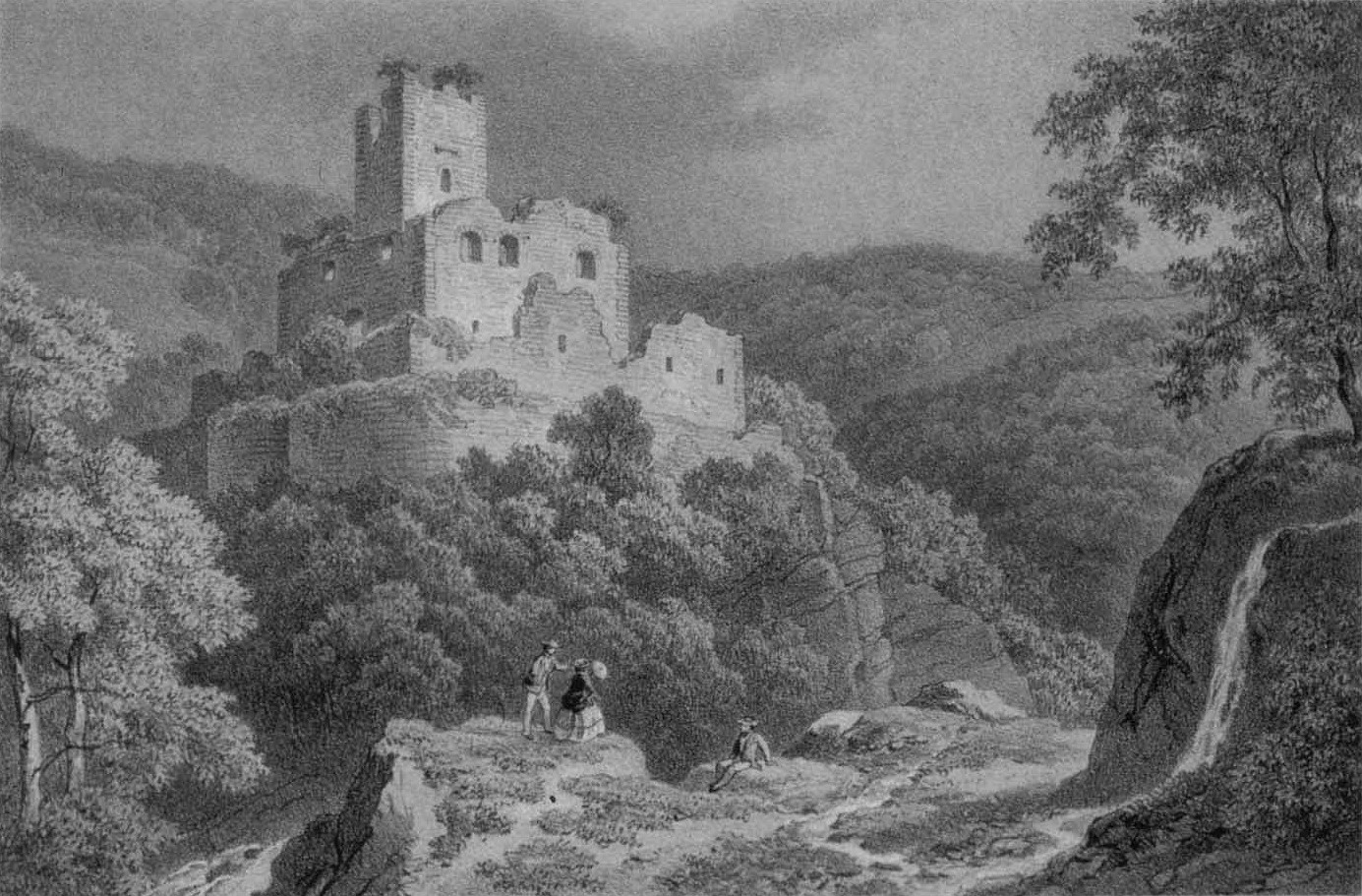 Ruines du château de Hageneck prés Wettolsheim